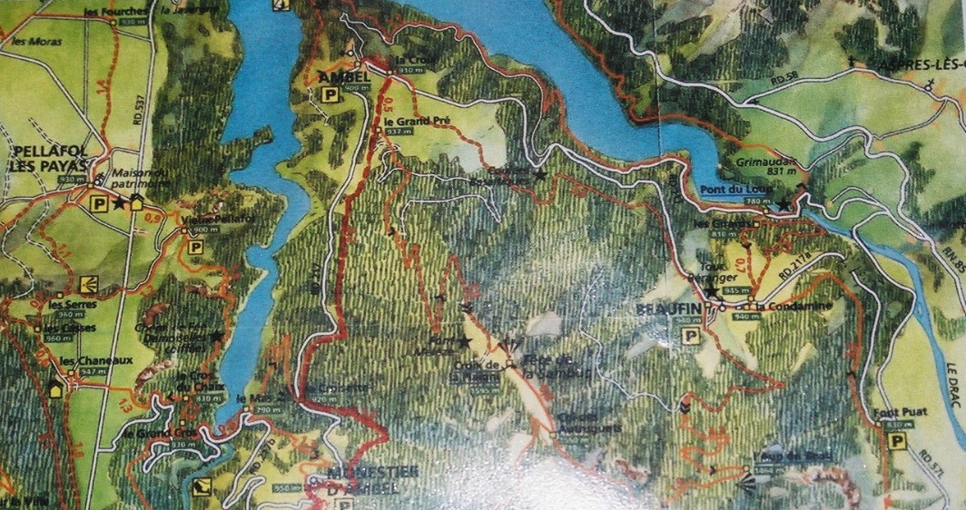 Carte des sentiers de promenade aux environs d'Ambel